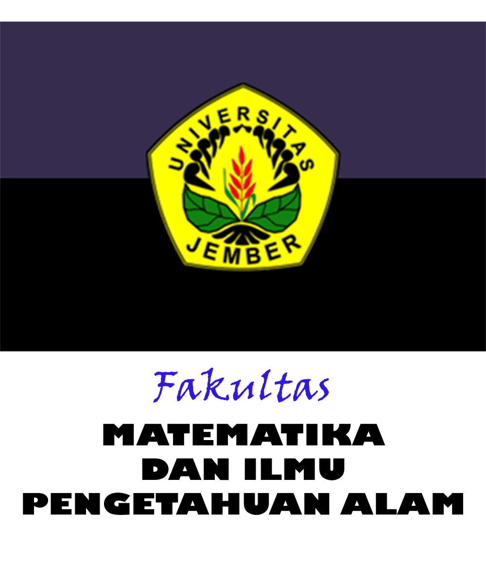 lambang unej beserta wana biru dan hitam yang sebagai warna fakultaas